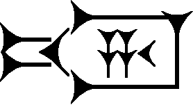 Cuneiform sign